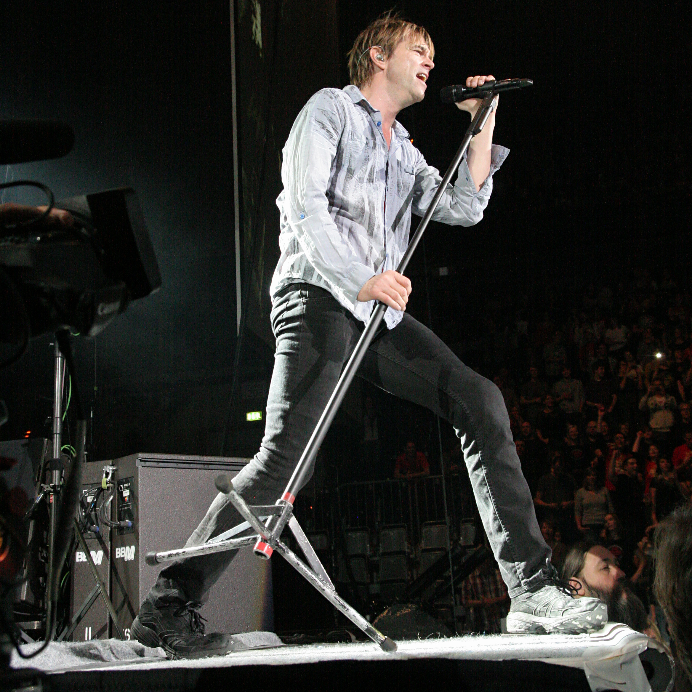 Campino, bürgerlich Andreas Frege, von den Toten Hosen am 15. Dezember 2012 in der SAP Arena in Mannheim.